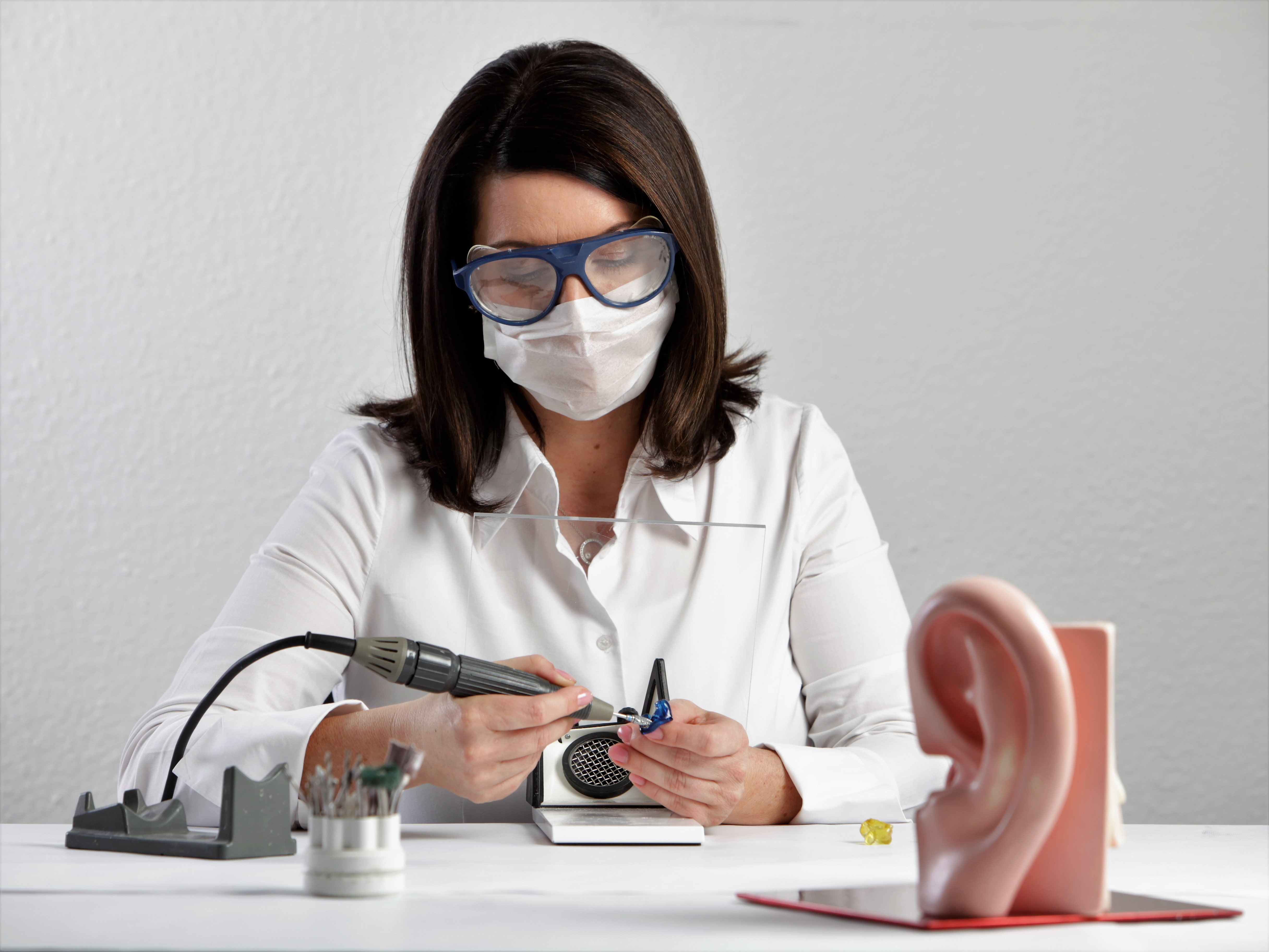 Hörakustikerin bei der Bearbeitung (Fräsen) eines Otoplastik-Rohlings, zur Verwendung bei einem Hinter-dem-Ohr-Hörgerät.